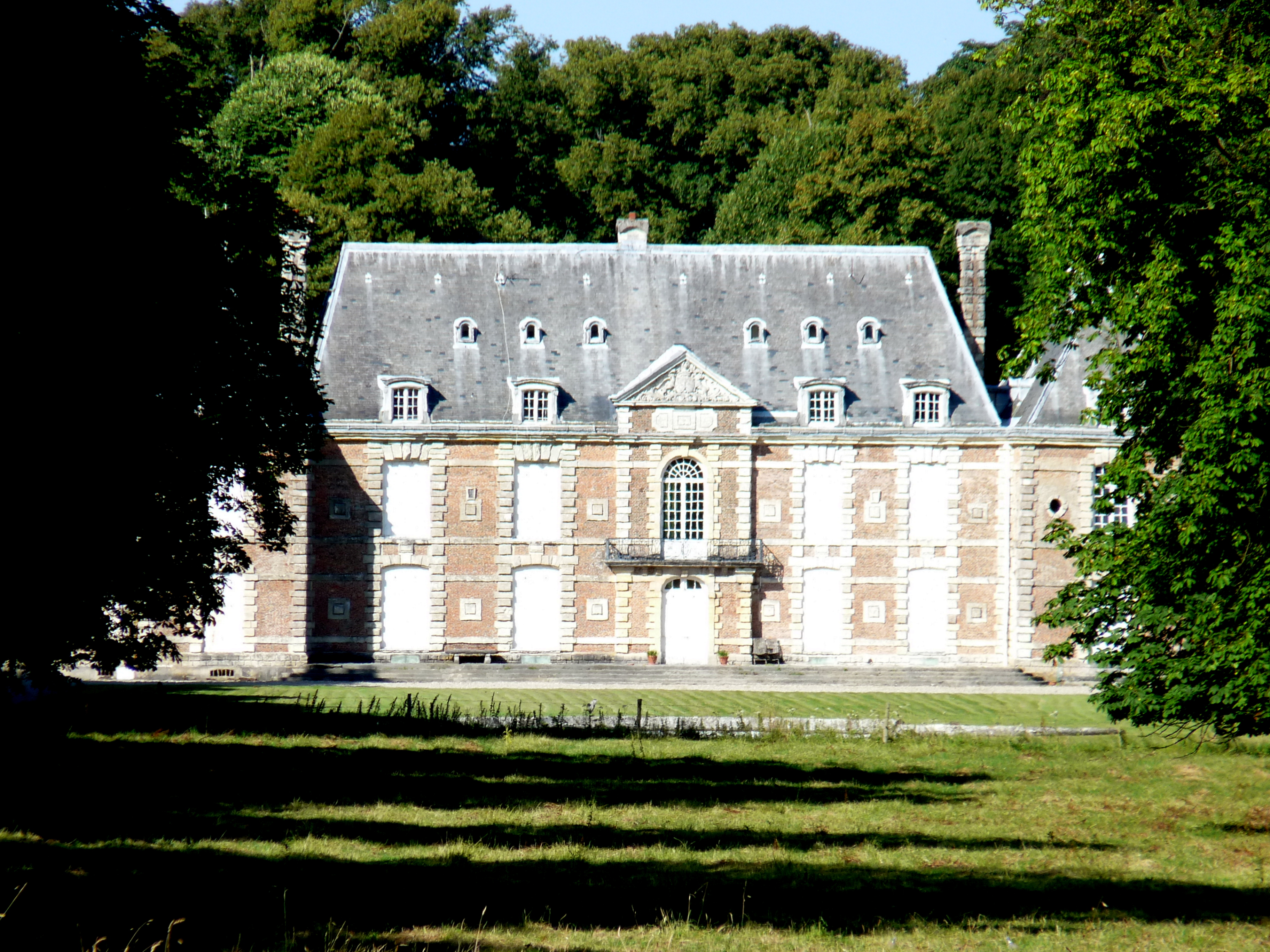 Château du Grand Daubeuf (InscritClassé) .